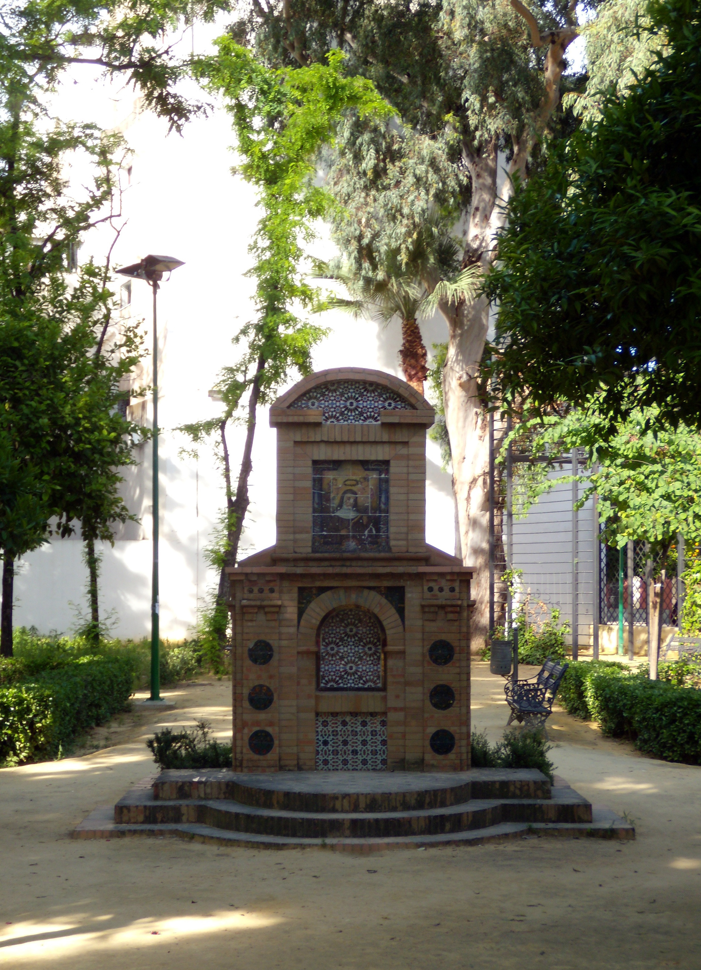 Monument dans les Jardins del Valle, à Séville (Espagne), dans le quartier de Santa Catalina